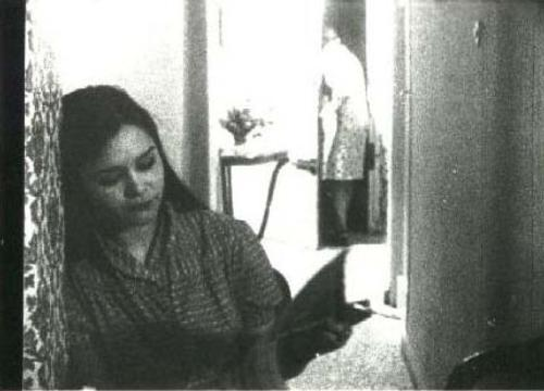 Fotograma de Guadalupe G. Güemes en la película Contactos (1970), de Paulino Viota, cedido por el autor